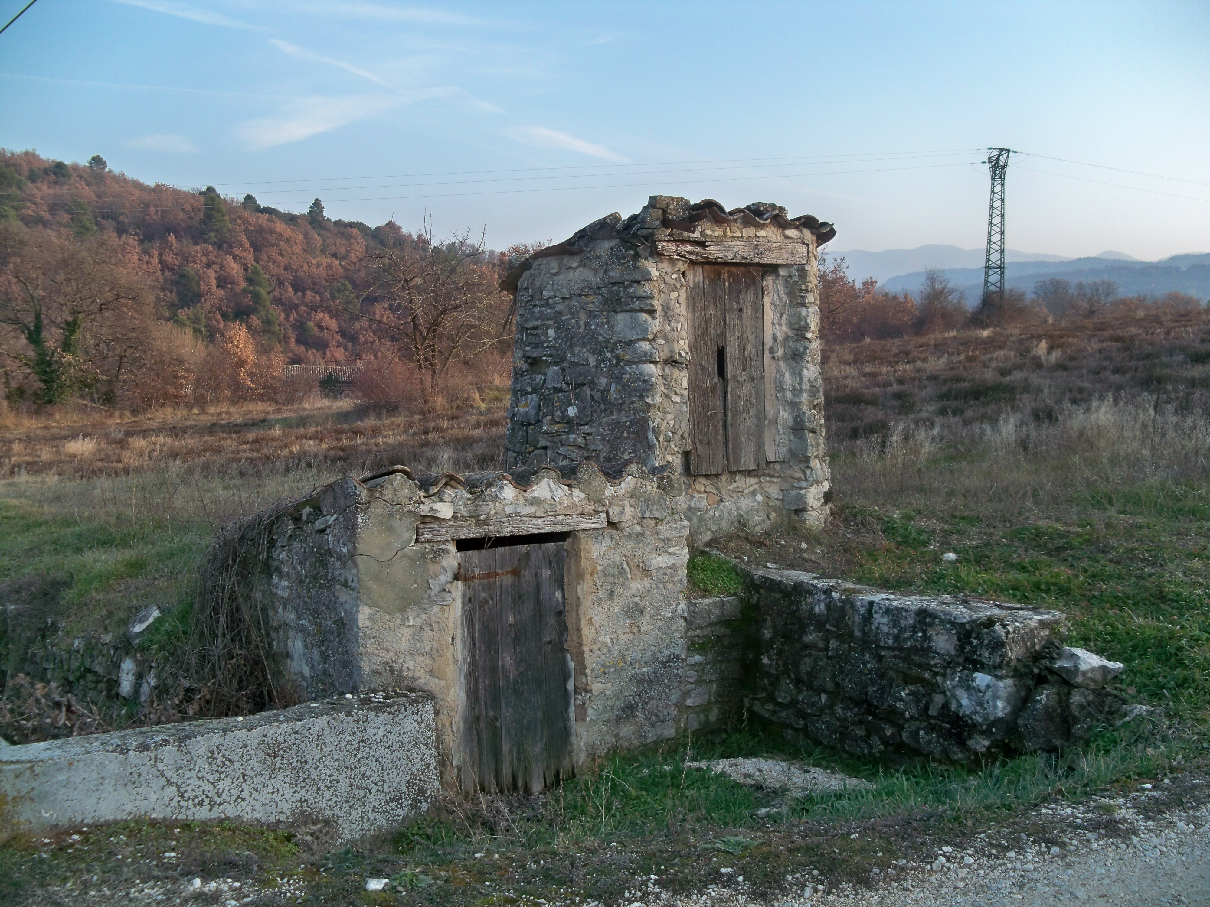 Puits couvert à Apt, Vaucluse, France